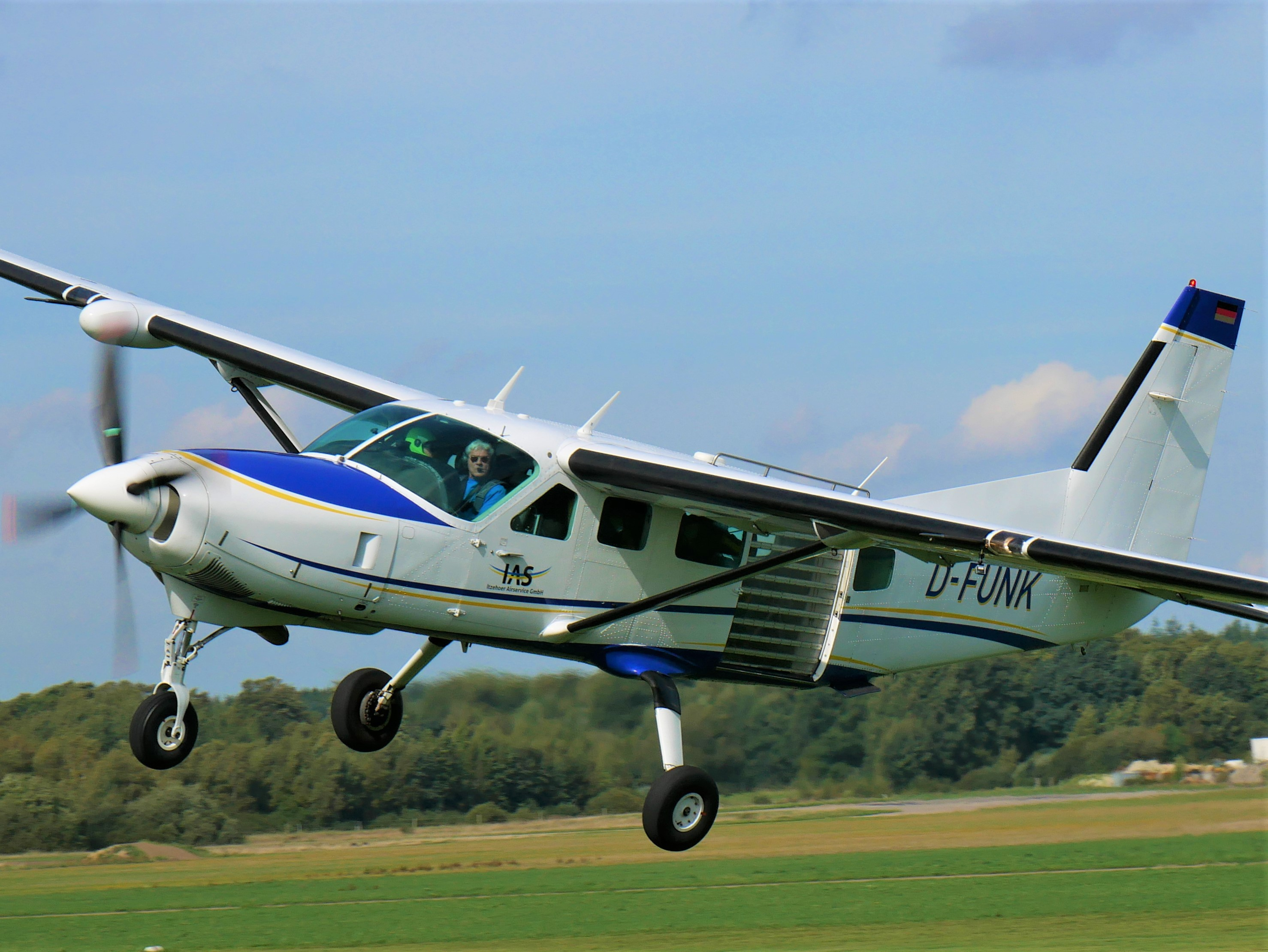 Cessna 208 Caravan, D-FUNK after Take-Off